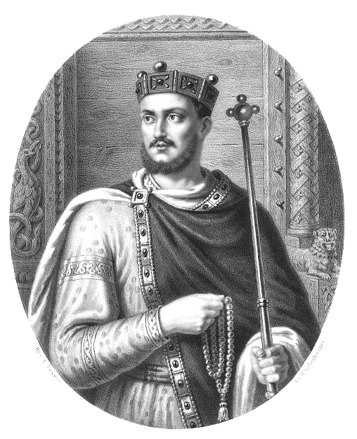 Mieszko II Lambert